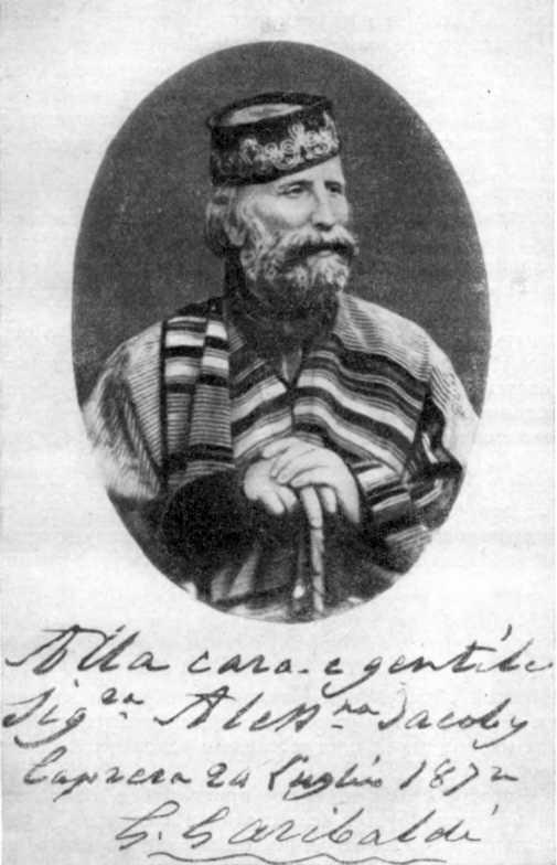 Джузеппе Гарибальди. Фотография с его автографом, подаренная в 1872 г. А. Н. Толиверовой-Якоби.